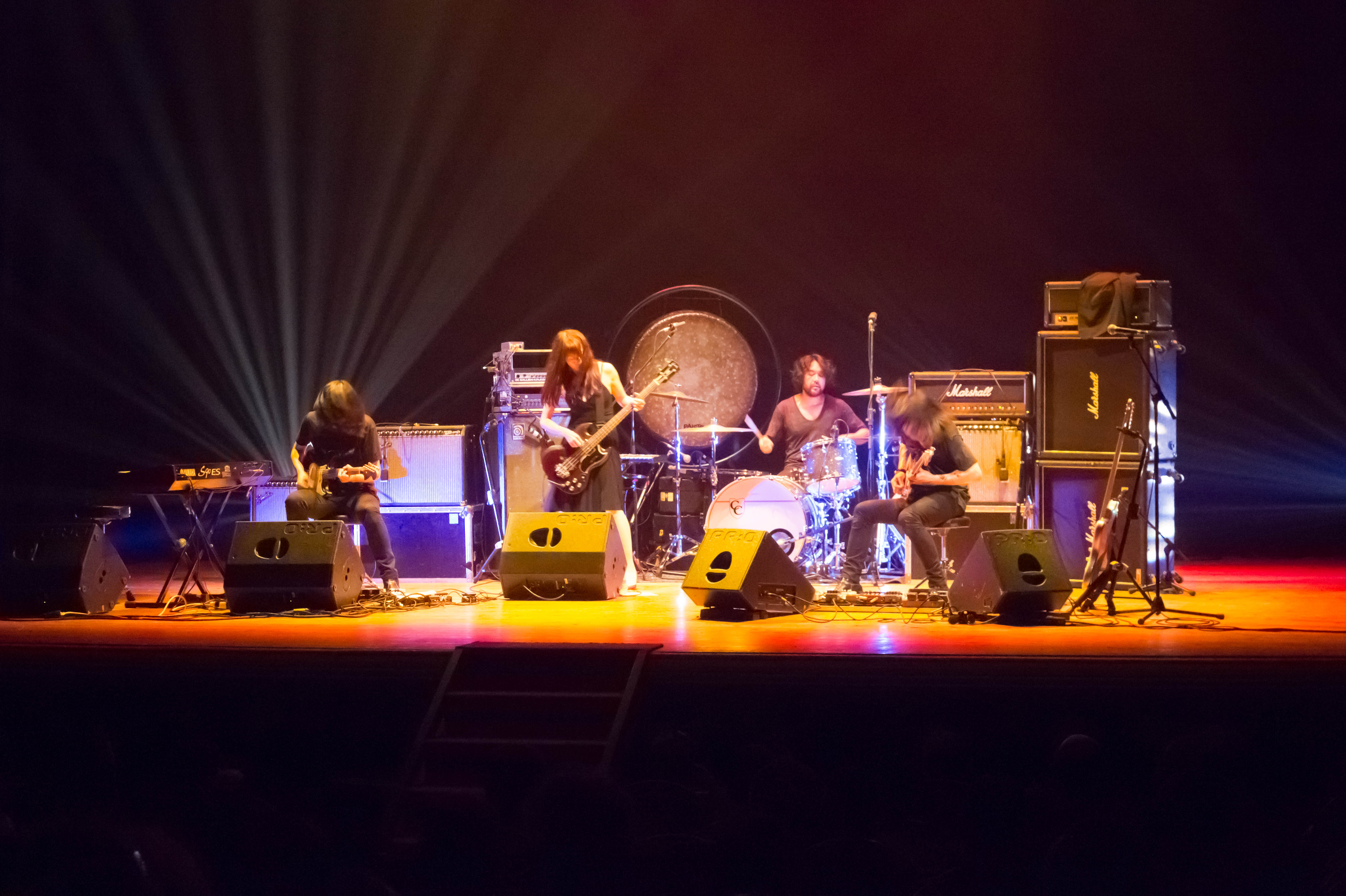 A banda de post-rock xaponesa Mono no Teatro Principal de Santiago de Compostela.